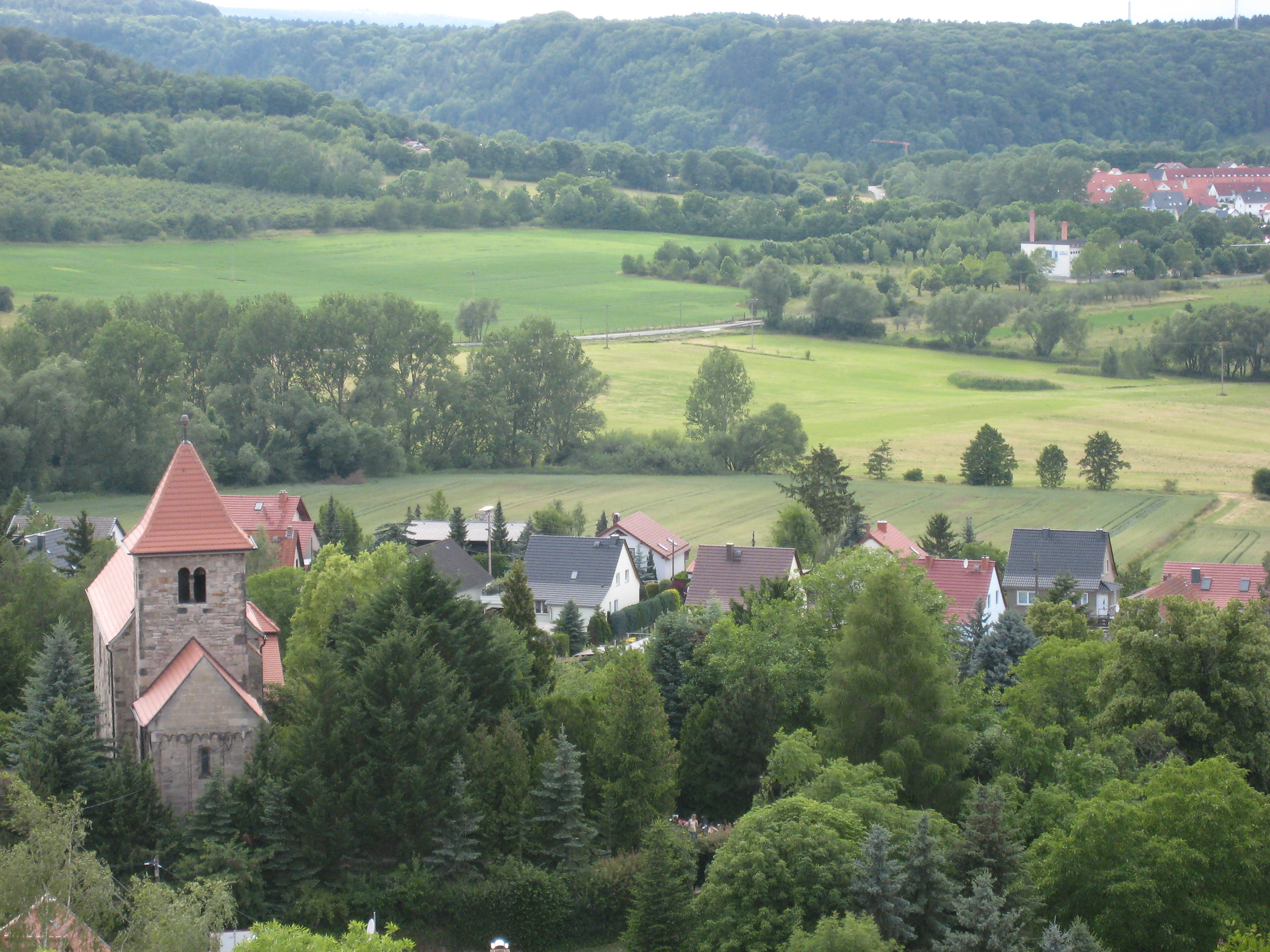 Oberndorf bei Arnstadt, links die Nikolaikirche